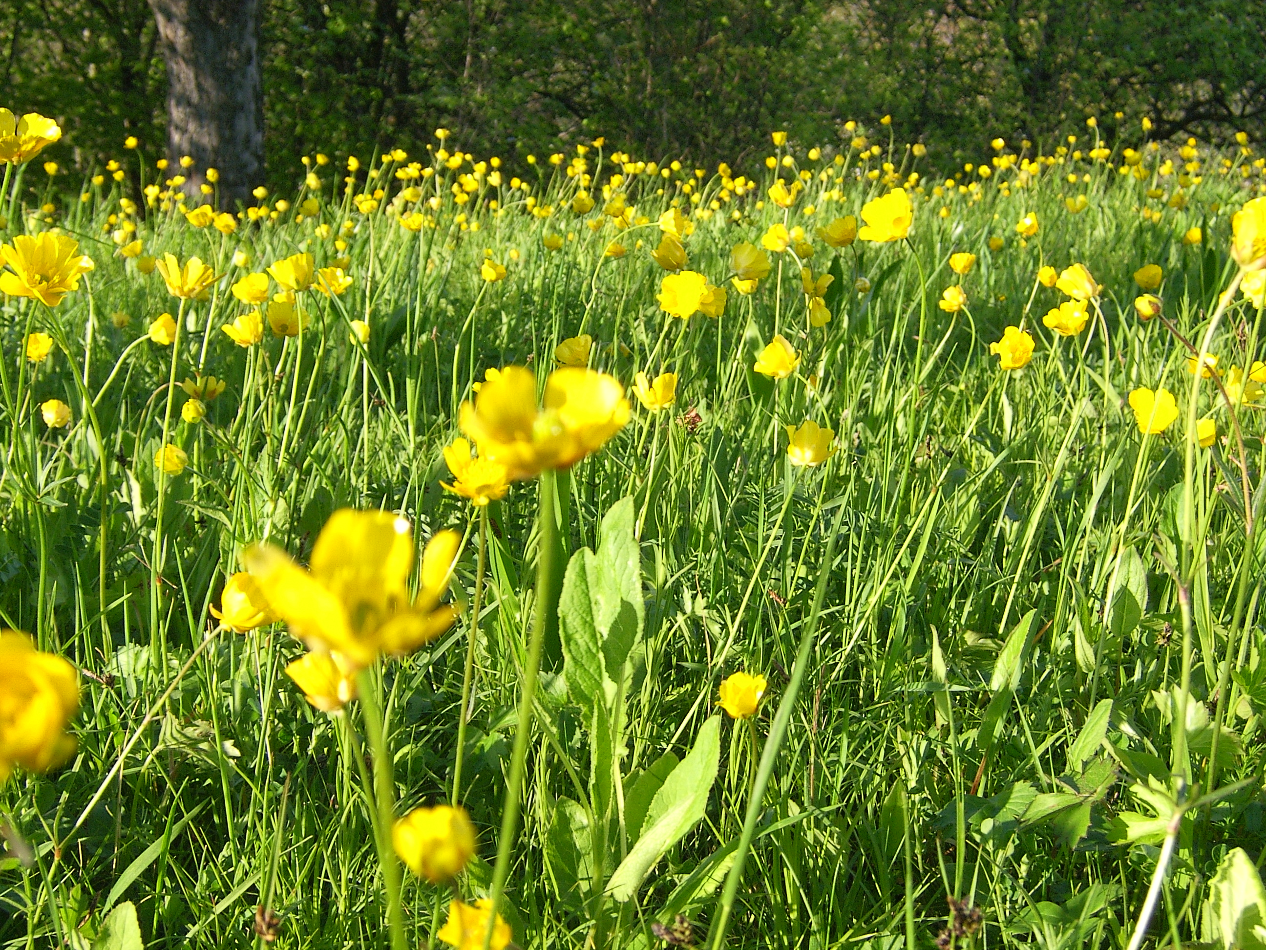 Gólyahírmező (Magyarvalkó, Erdély)